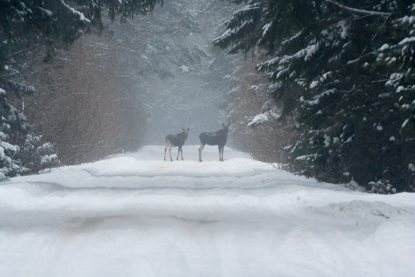 Klempa z łoszakiem na Carskiej Drodze (Carskim Trakcie) niedaleko Twierdzy Osowiec podczas intensywnego opadu śniegu, 18 lutego 2006. This is a photography of Natura 2000 protected area with ID PLB200006 This is a photography of Natura 2000 protected area with ID PLH200008